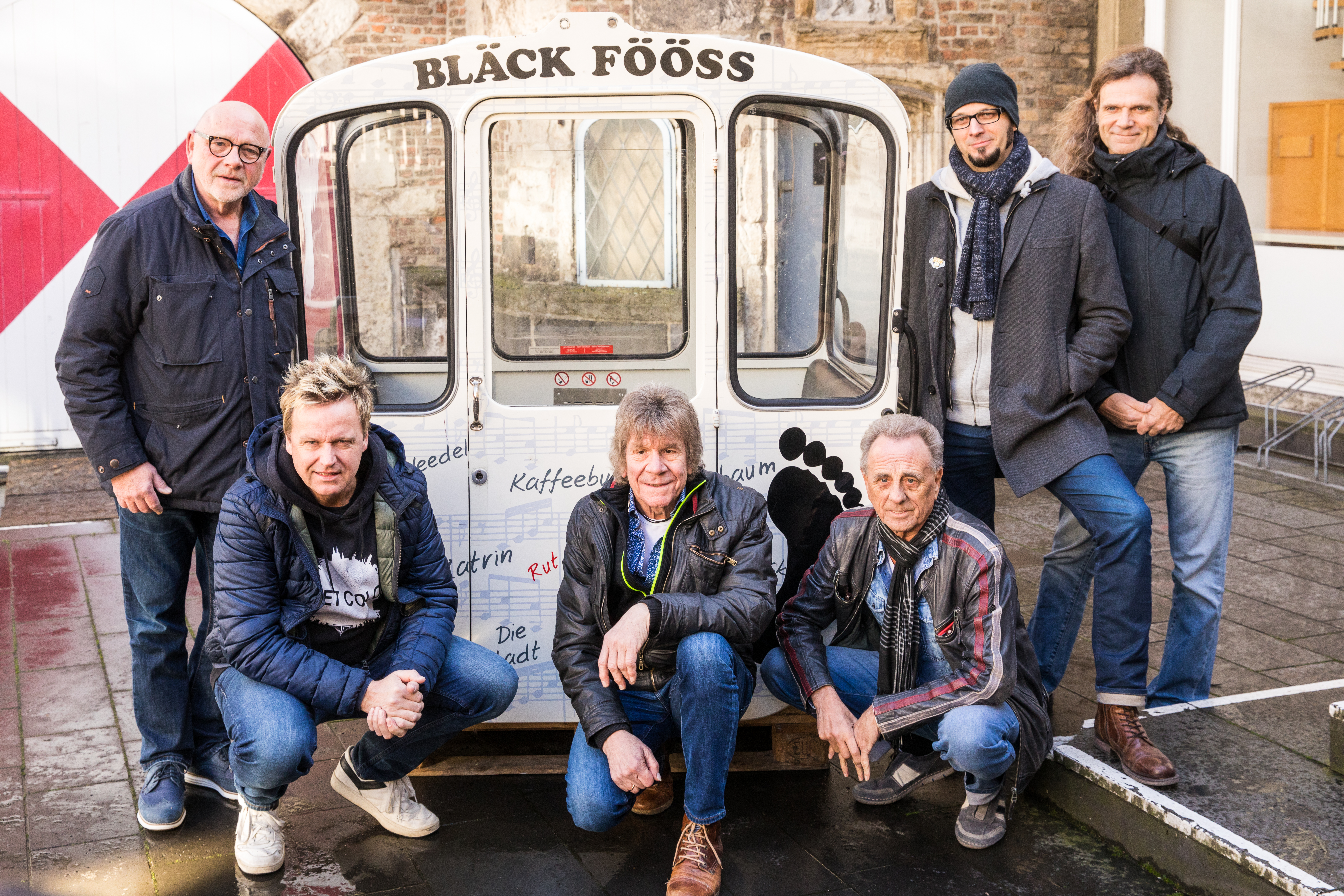 Übergabe einer Bläck Fööss-Gondel der Kölner Seilbahn an das Kölnische Stadtmuseum in Vorbereitung der Sonderausstellung: „50 JOHR BLÄCK FÖÖSS: Die Jubiläumsausstellung“ (21. März bis 28. Juni 2020)